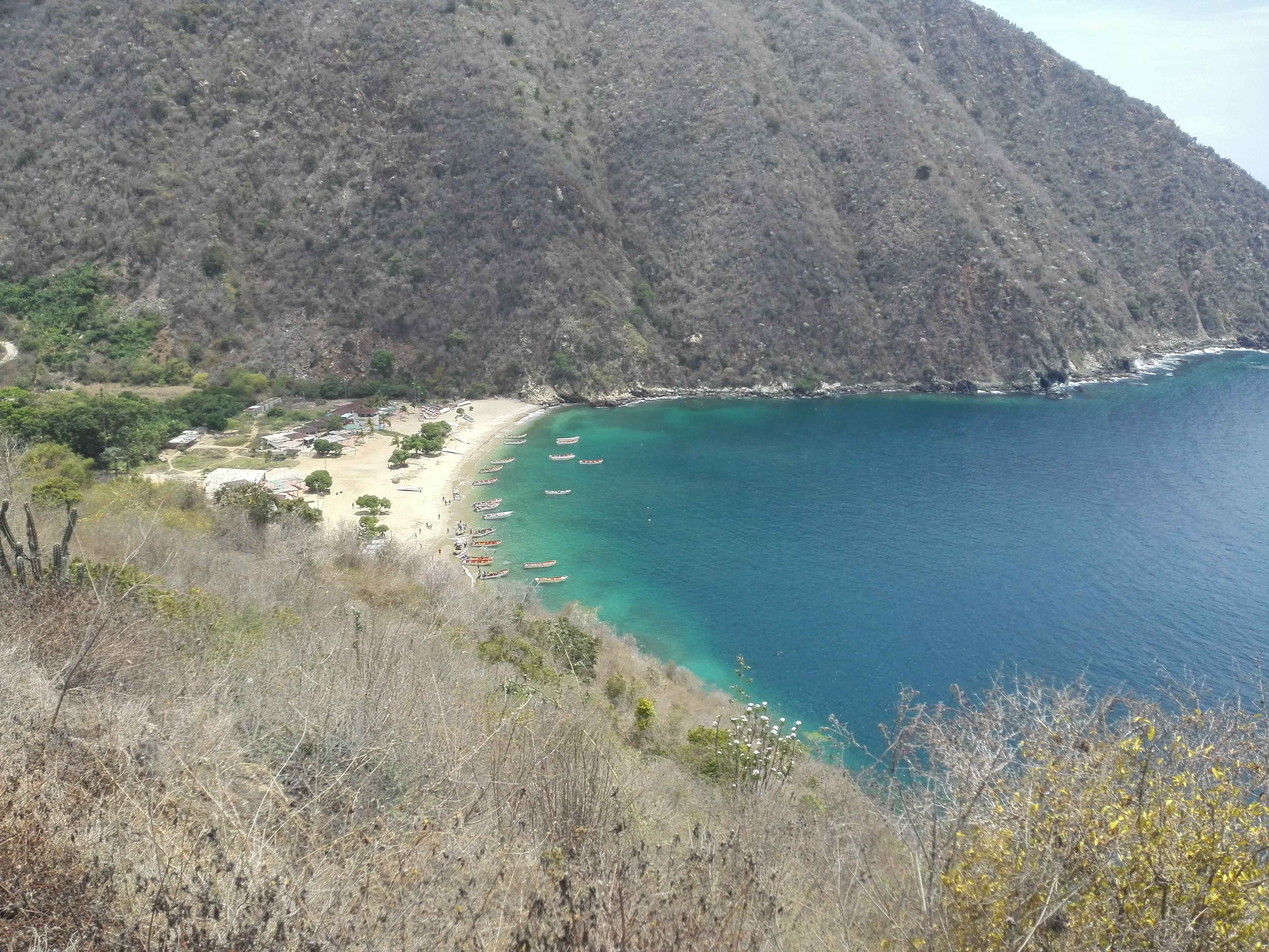 Imagen de la bahía de Puerto Cruz